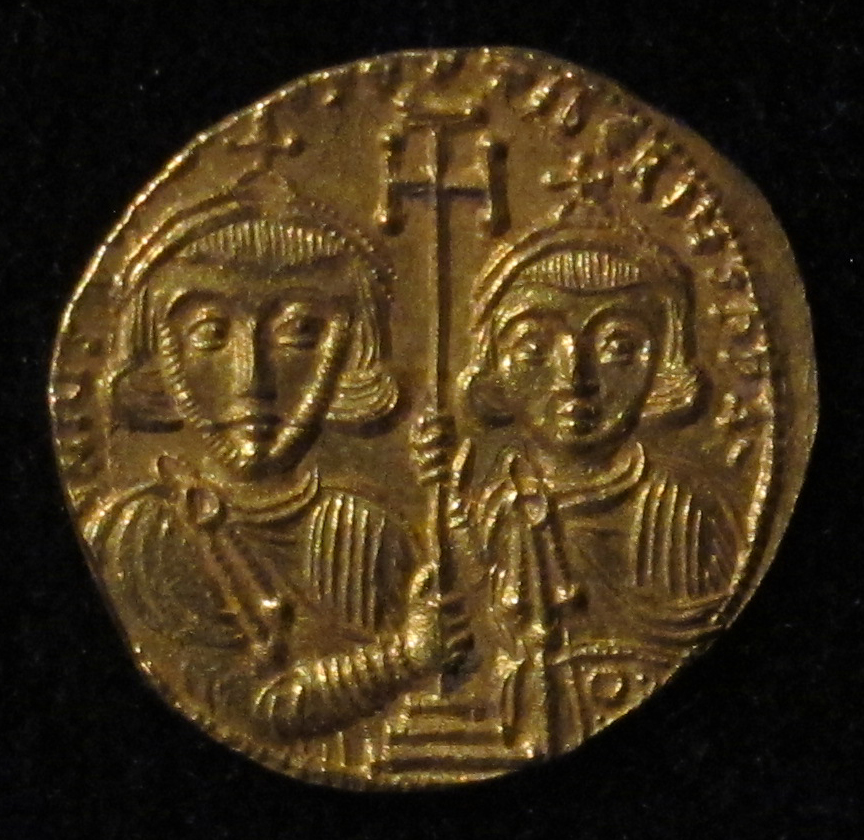 Monete d'oro di giustiniano II e tiberio IV, 705-711, 02, 9